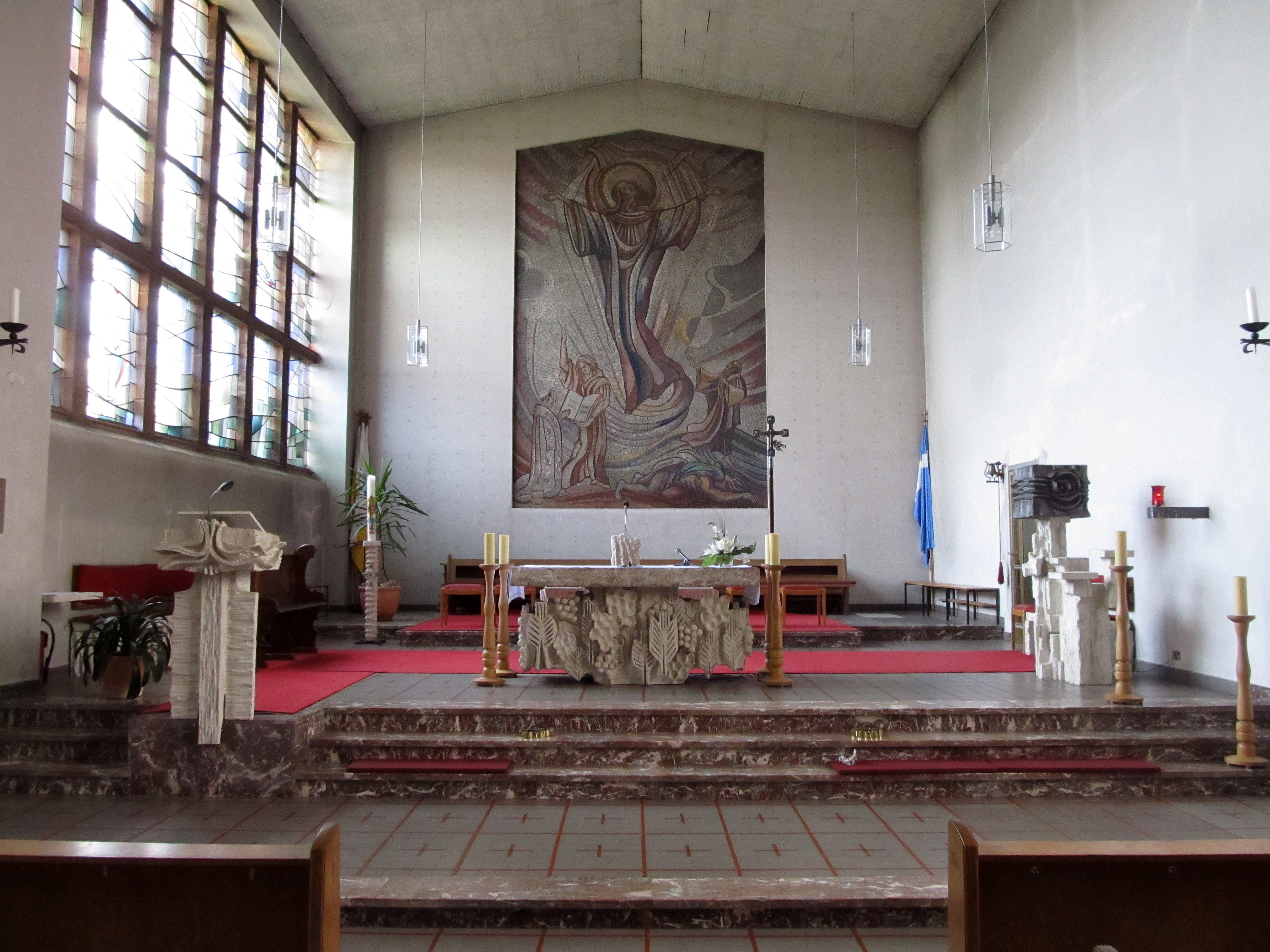 Der Altarraum der katholischen Pfarr- und Wallfahrtskirche Mariä Himmelfahrt in Kirrberg, Saarland